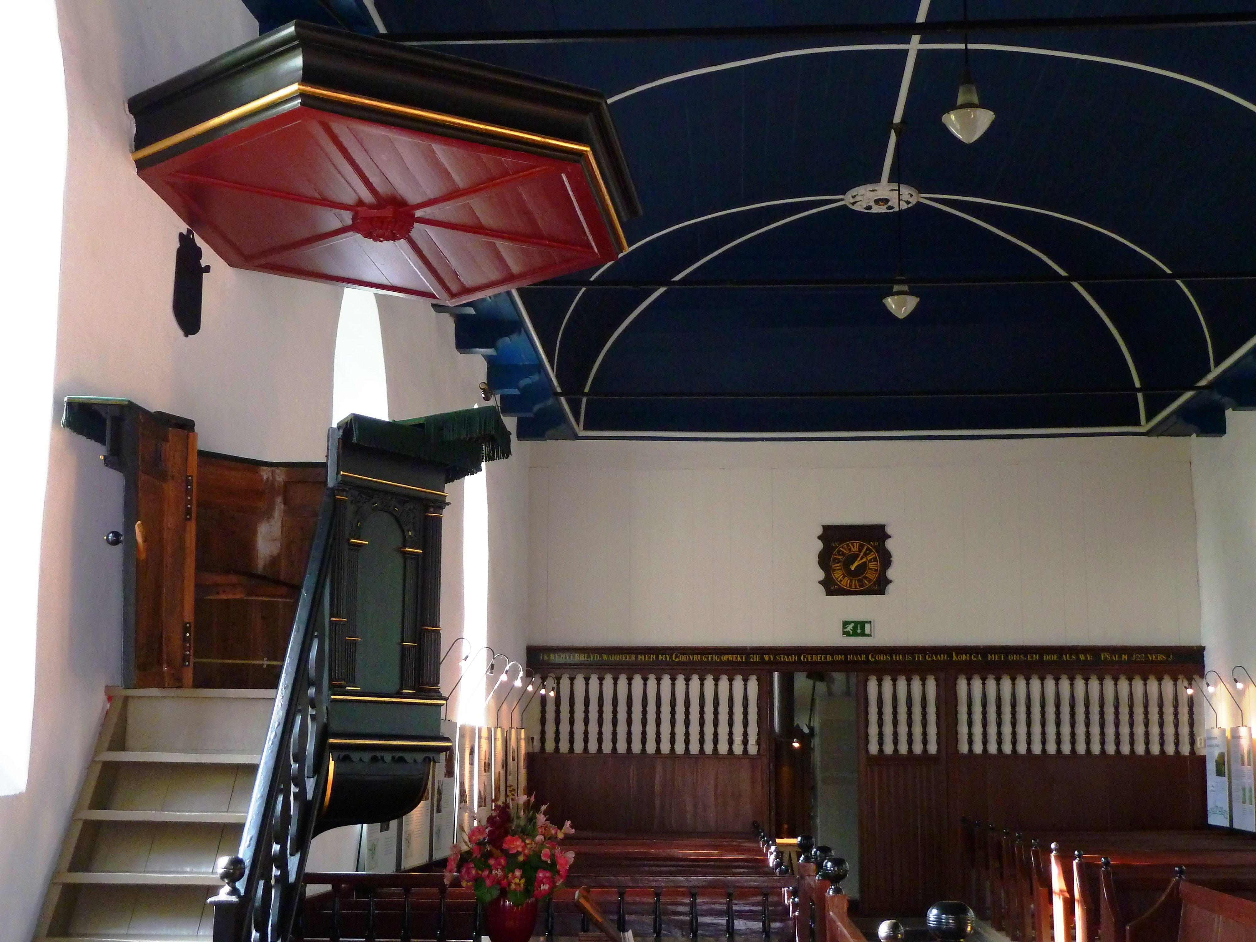 Preekstoel en hek op de plaats van het vroegere koorhek in de kerk van Niehove.